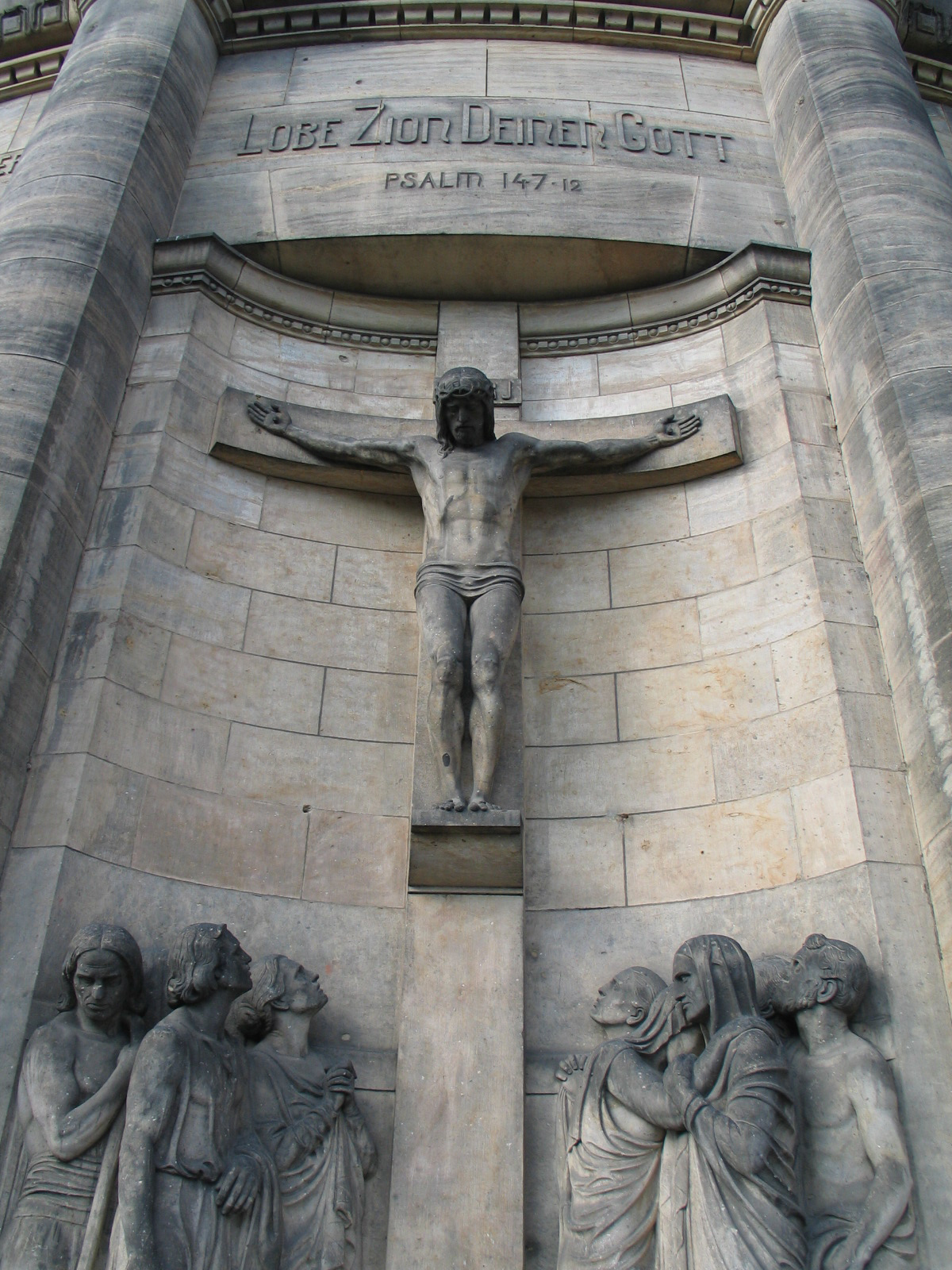 Detail der Alten Zionskirche auf der Nürnberger Straße in der Südvorstadt Dresden